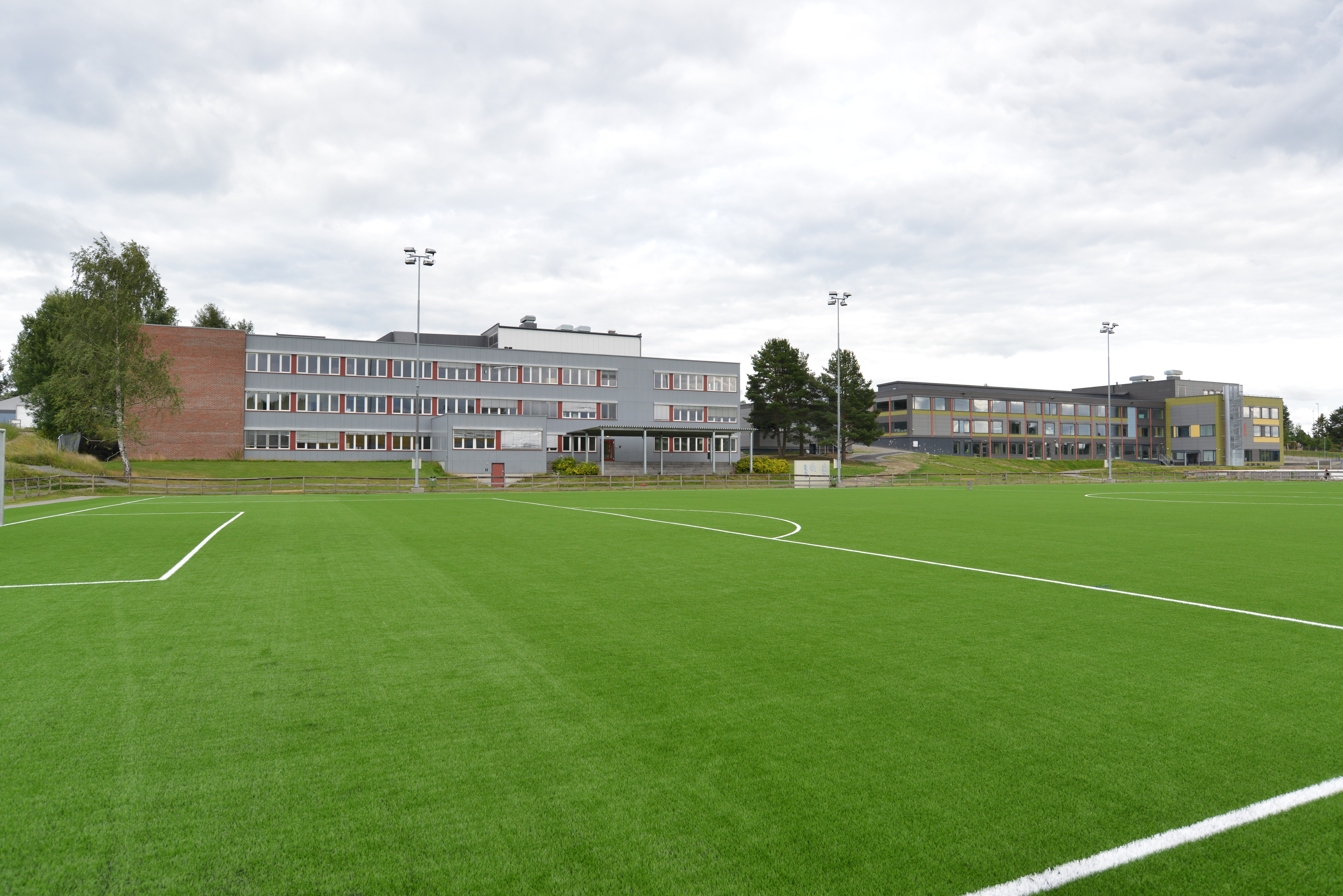 Bakkedalen kunstgressbane med Vesong og Bakke skoler